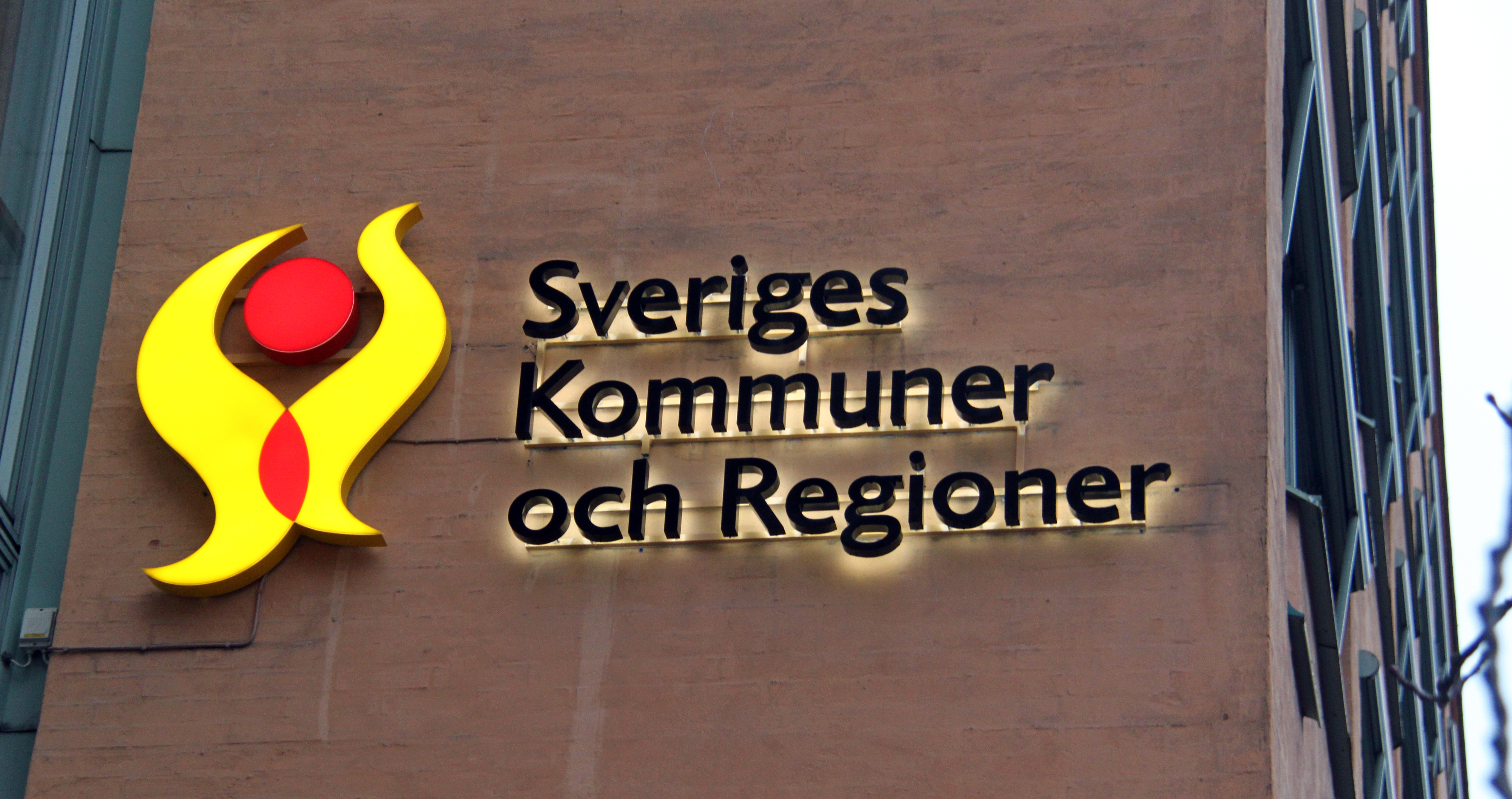 Logotyp på fasaden till kvarteret Överkikaren, där Sveriges Kommuner och Regioner inryms.